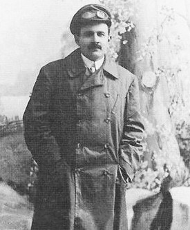 Erik Åkerlind, godsherre på Jordanstorp mellan 1908 och 1912, omkom vid Titanics förlisning.